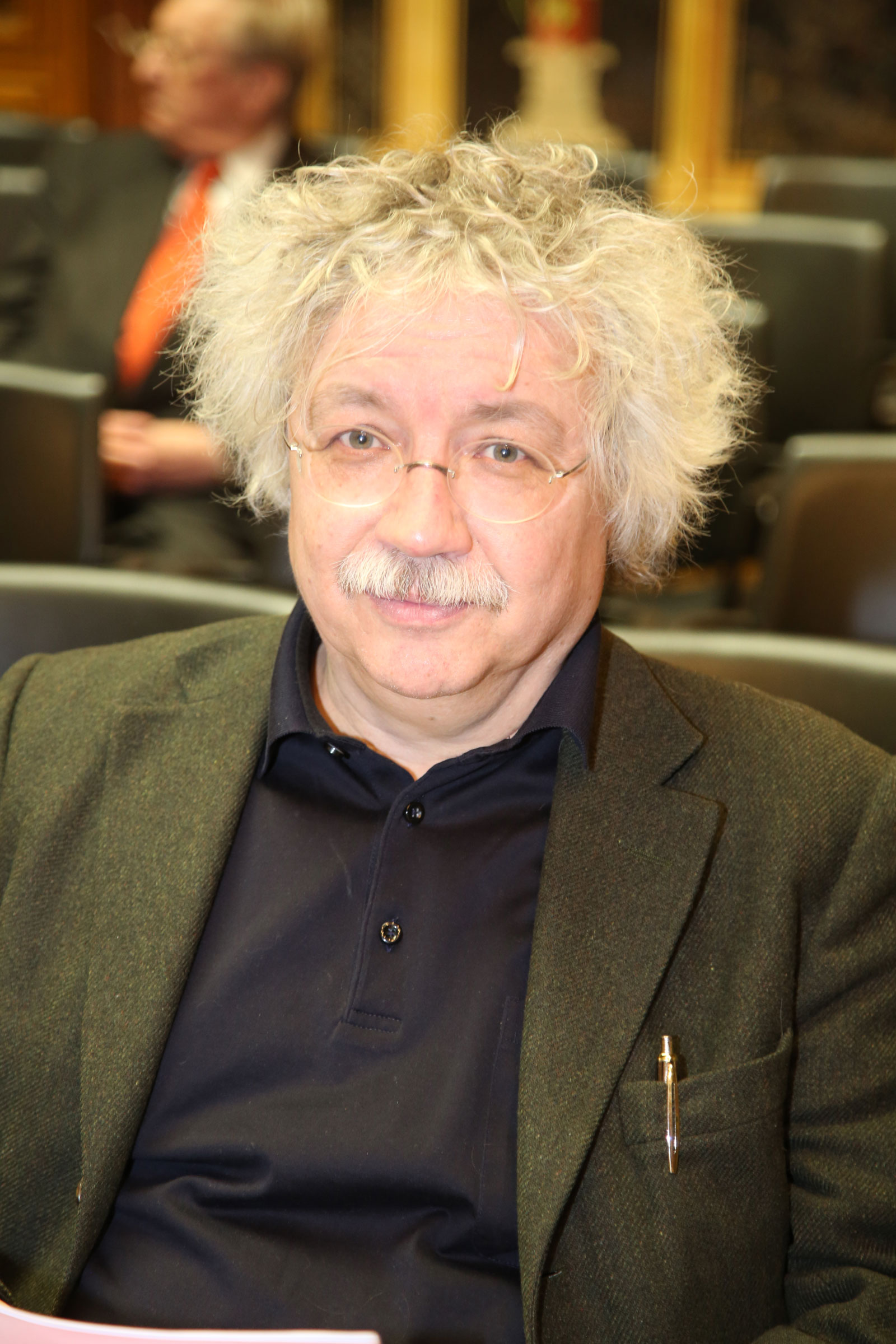 Gauß.Karl-Markus-6460